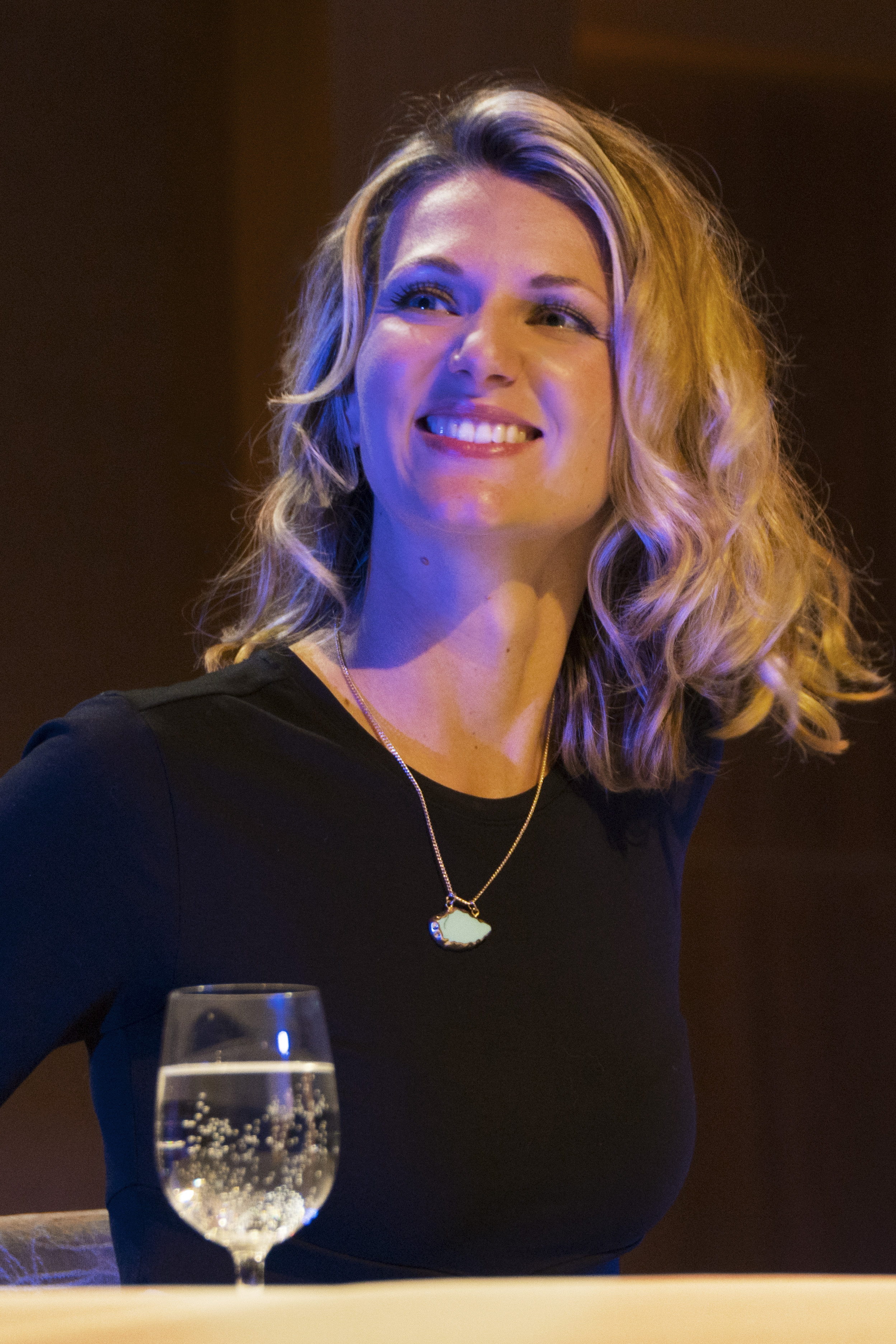 Ella Endlich bei einer Autogrammstunde, 2017